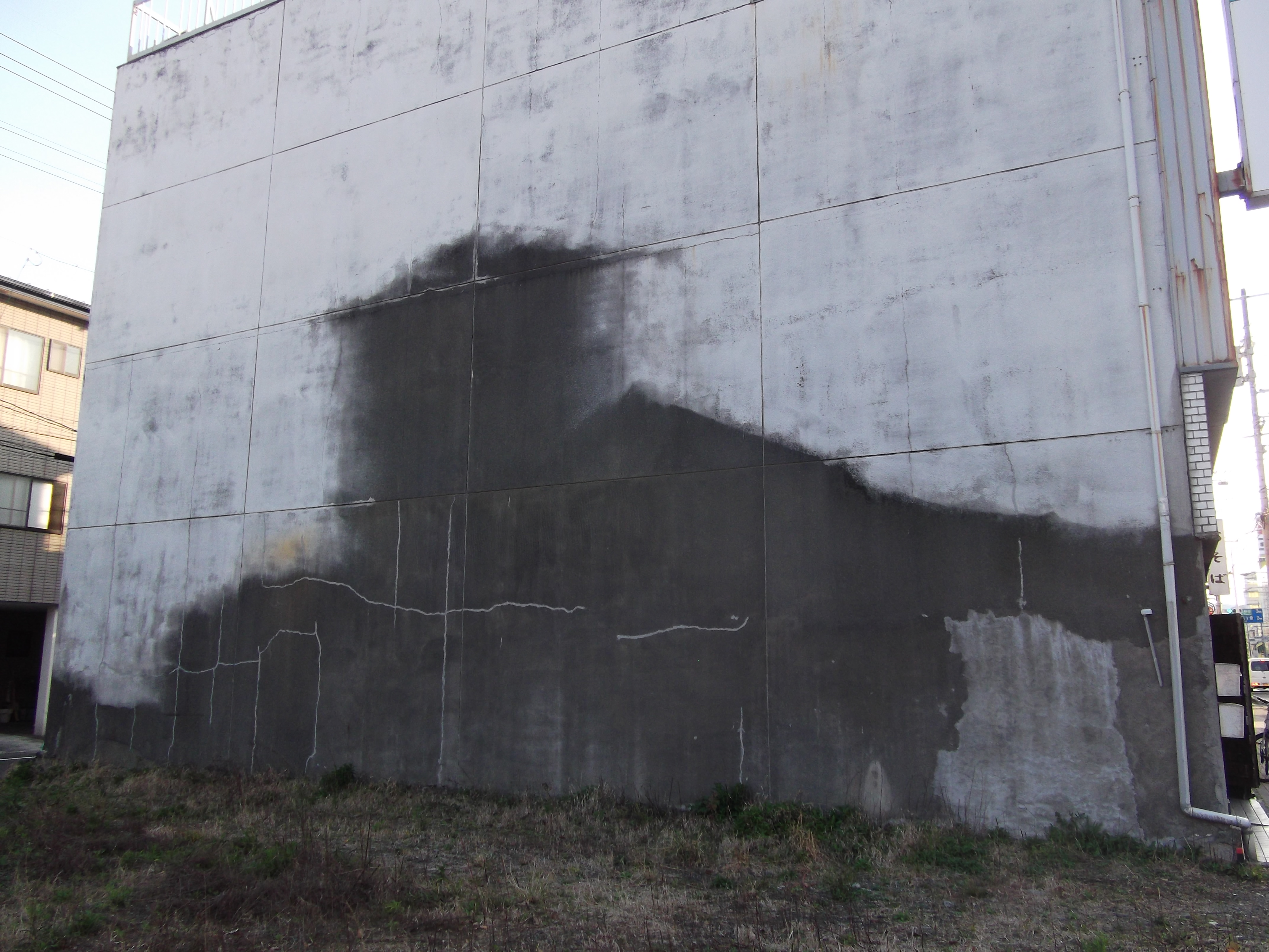 駿河区の南幹線沿いで見つけた原爆型トマソン。かなり縁取りがぼやけている。